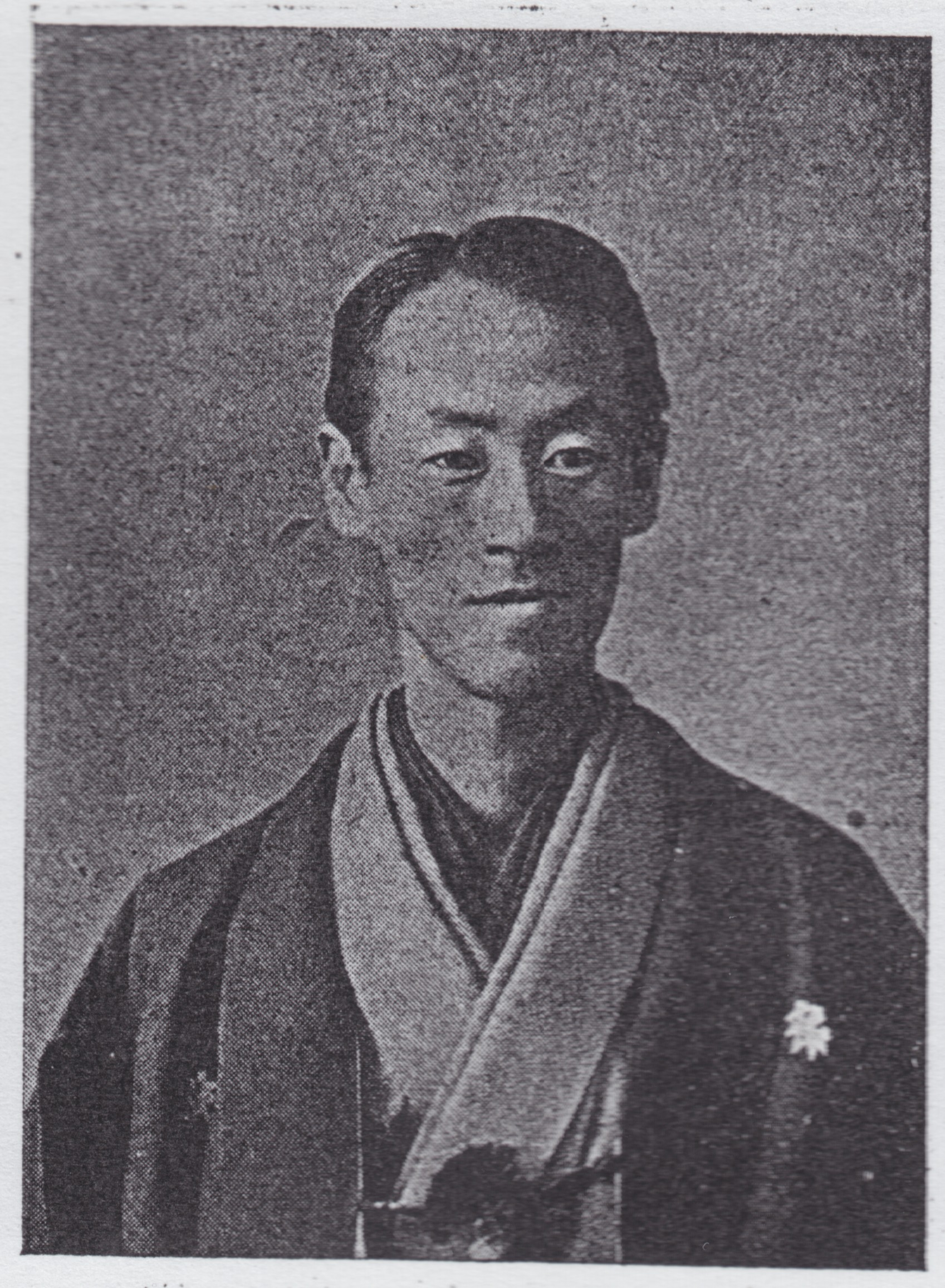 貴族院議員正四位子爵久世通章の写真